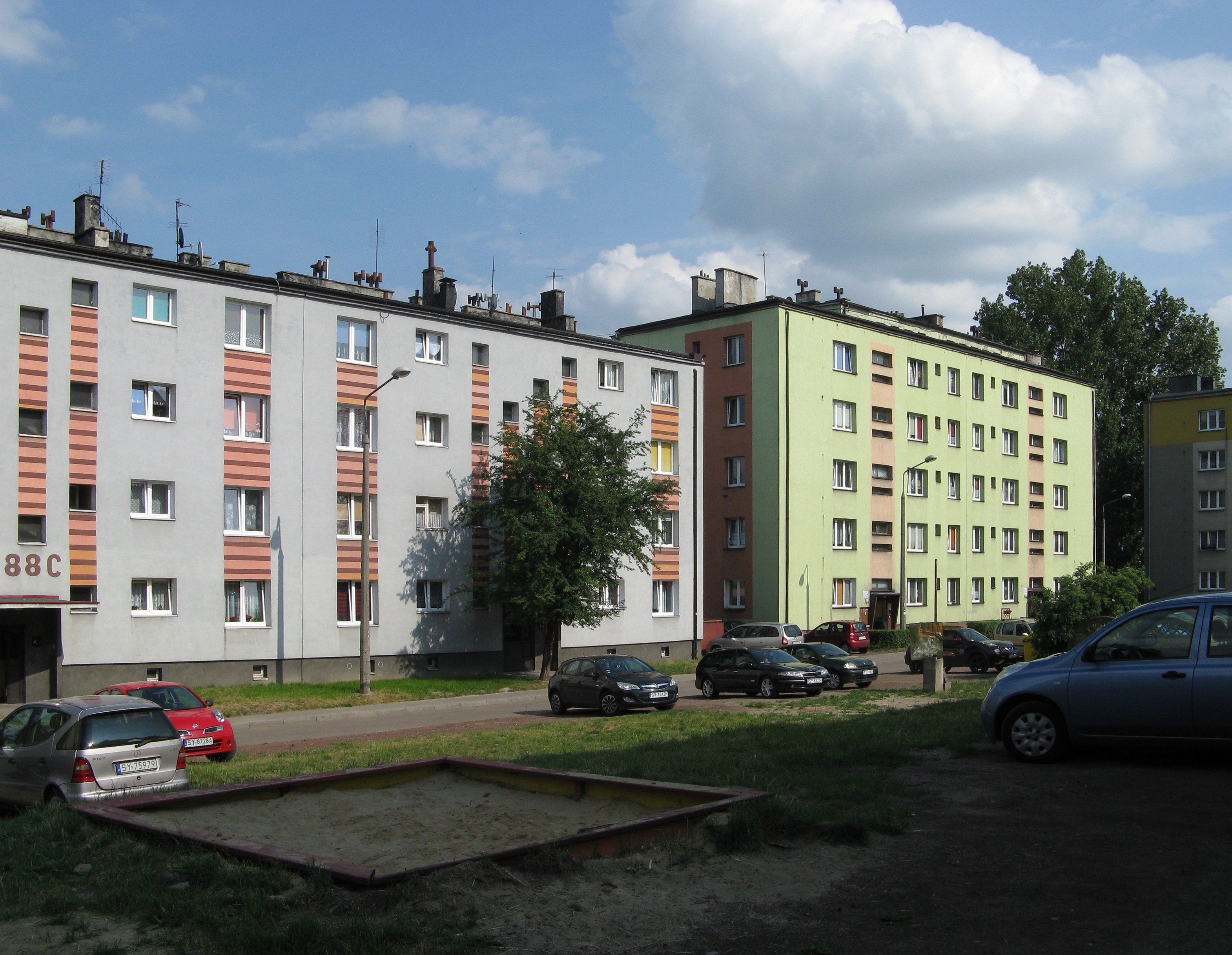 Bloki przy ul. Konstytucji (88c i 88b) w Bytomiu-Karbiu.